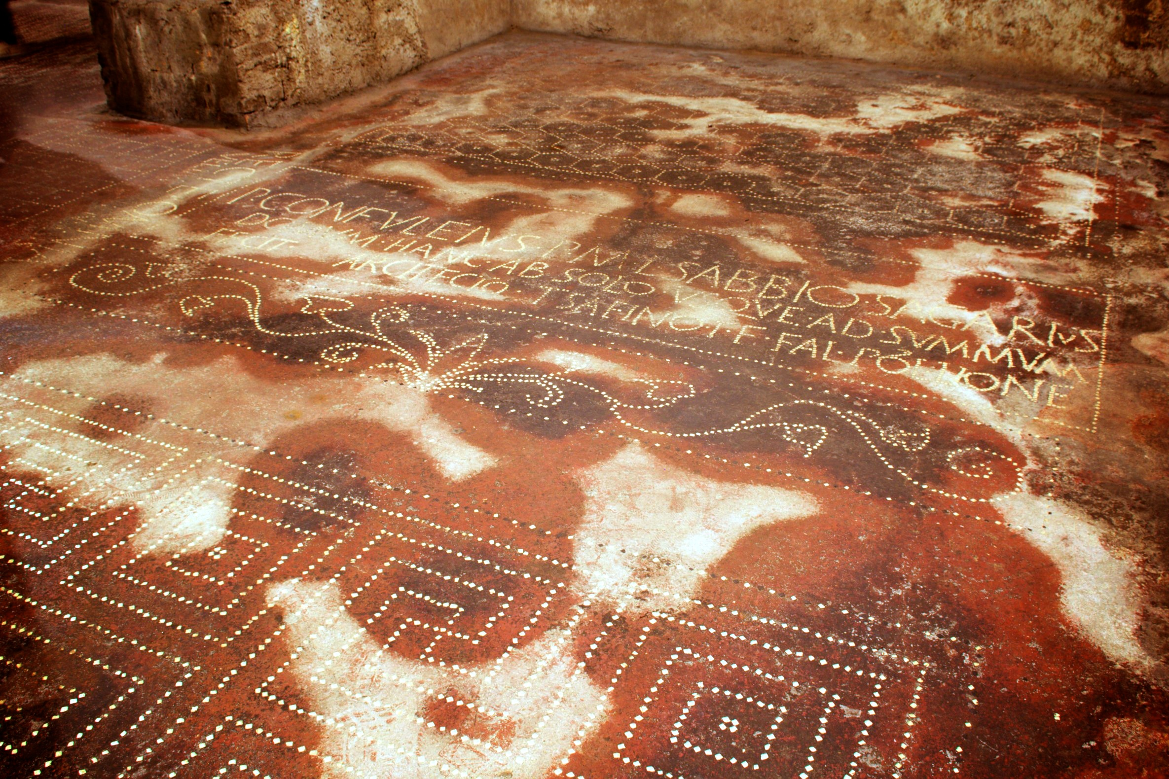 Domus Confuleius - Mosaico con Epigrafe Sala 2 This is a photo of a monument which is part of cultural heritage of Italy.